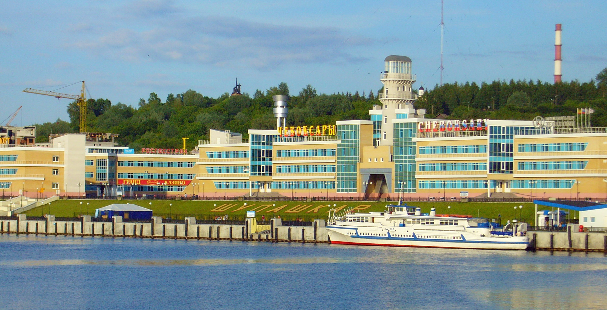 Июнь 2008